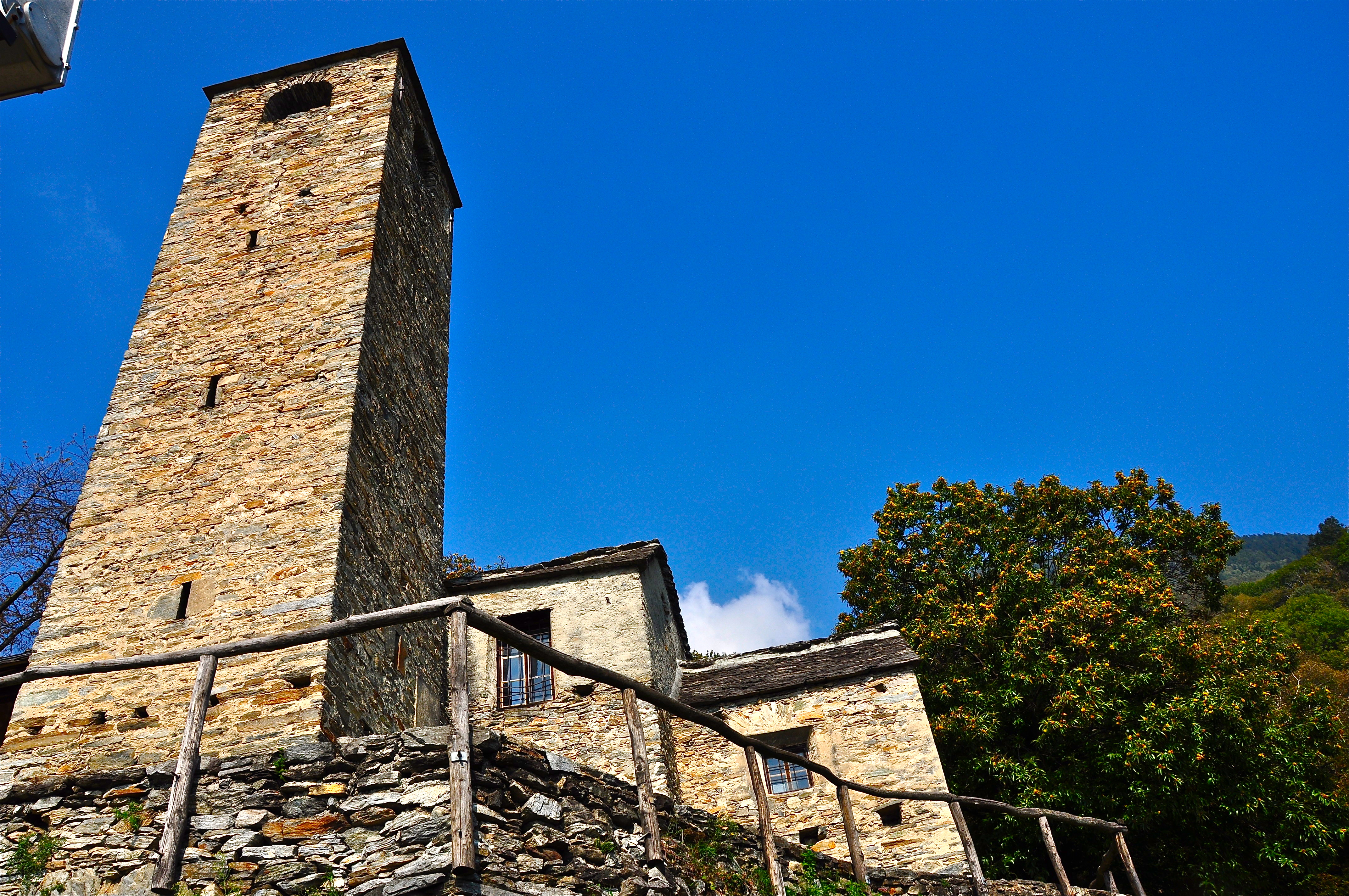 Il Campanile (XV sec.).